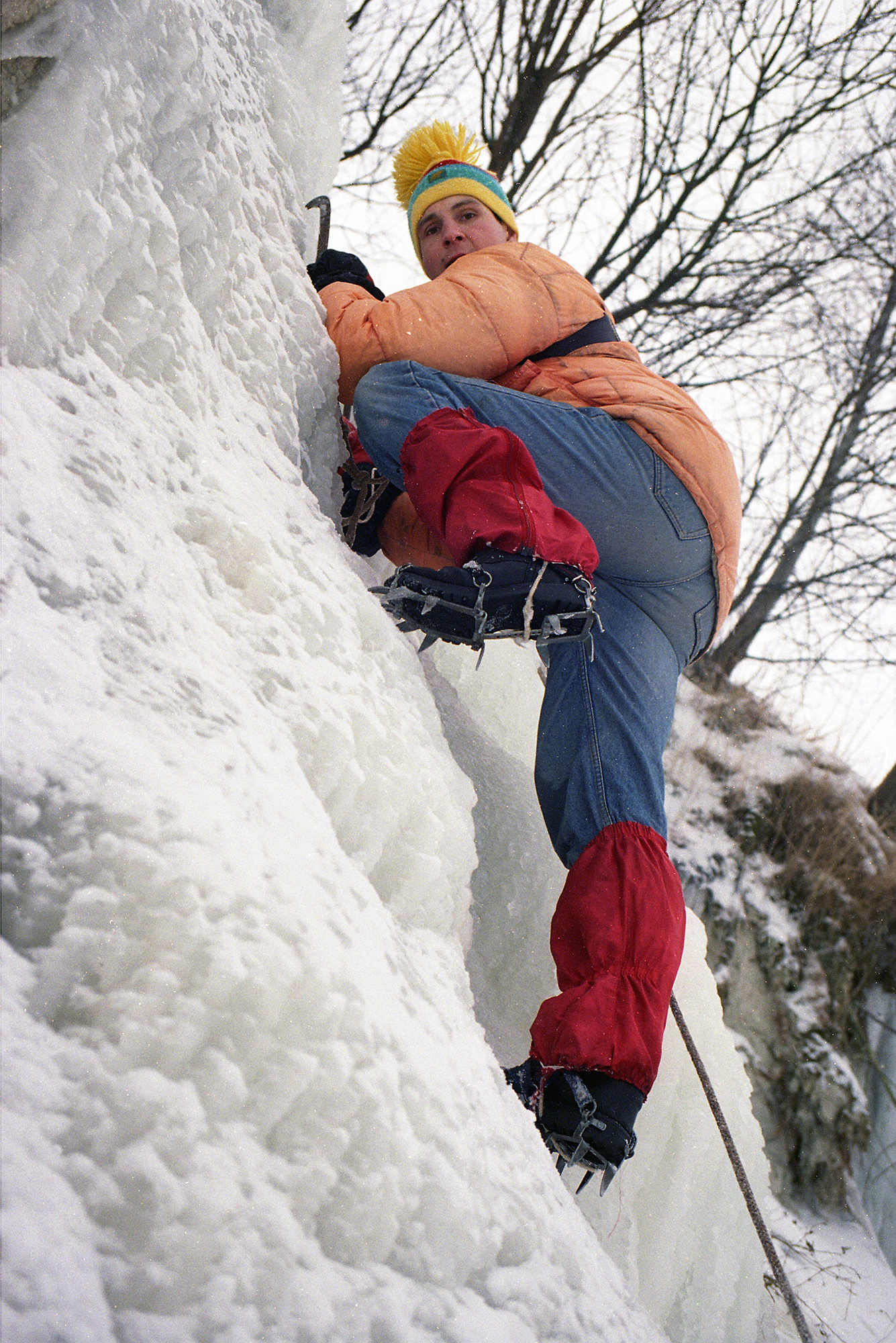 Riho Västrik, filmiprodutsent ja ajaloolane jääseinal 99